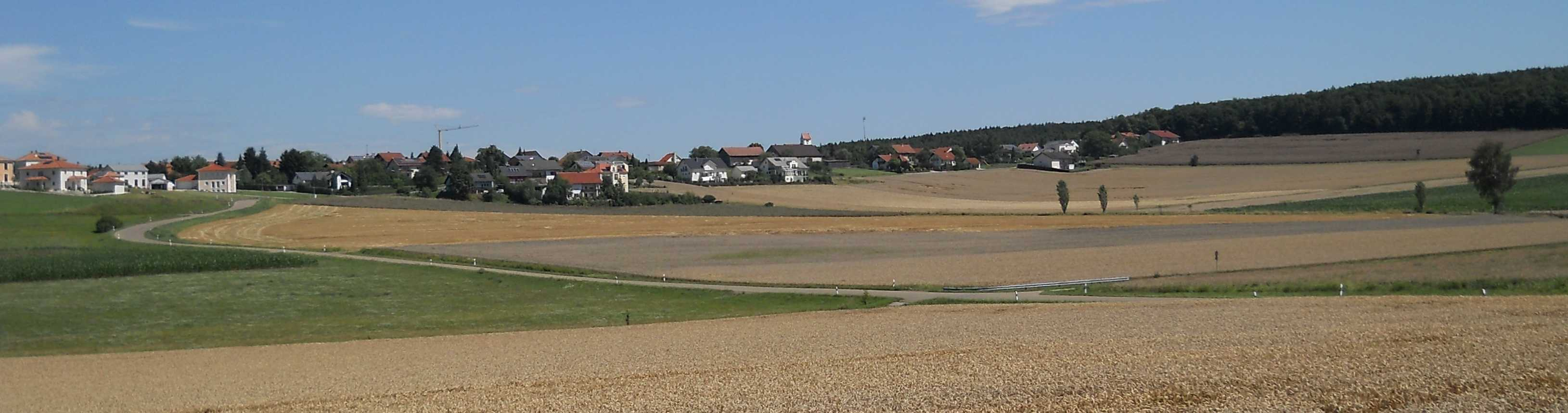 Dunsdorf, Ortsteil der Gemeinde Kipfenberg im Landkreis Eichstätt, Oberbayern